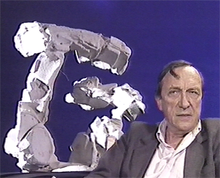 Portrait de Gérard Lanvin